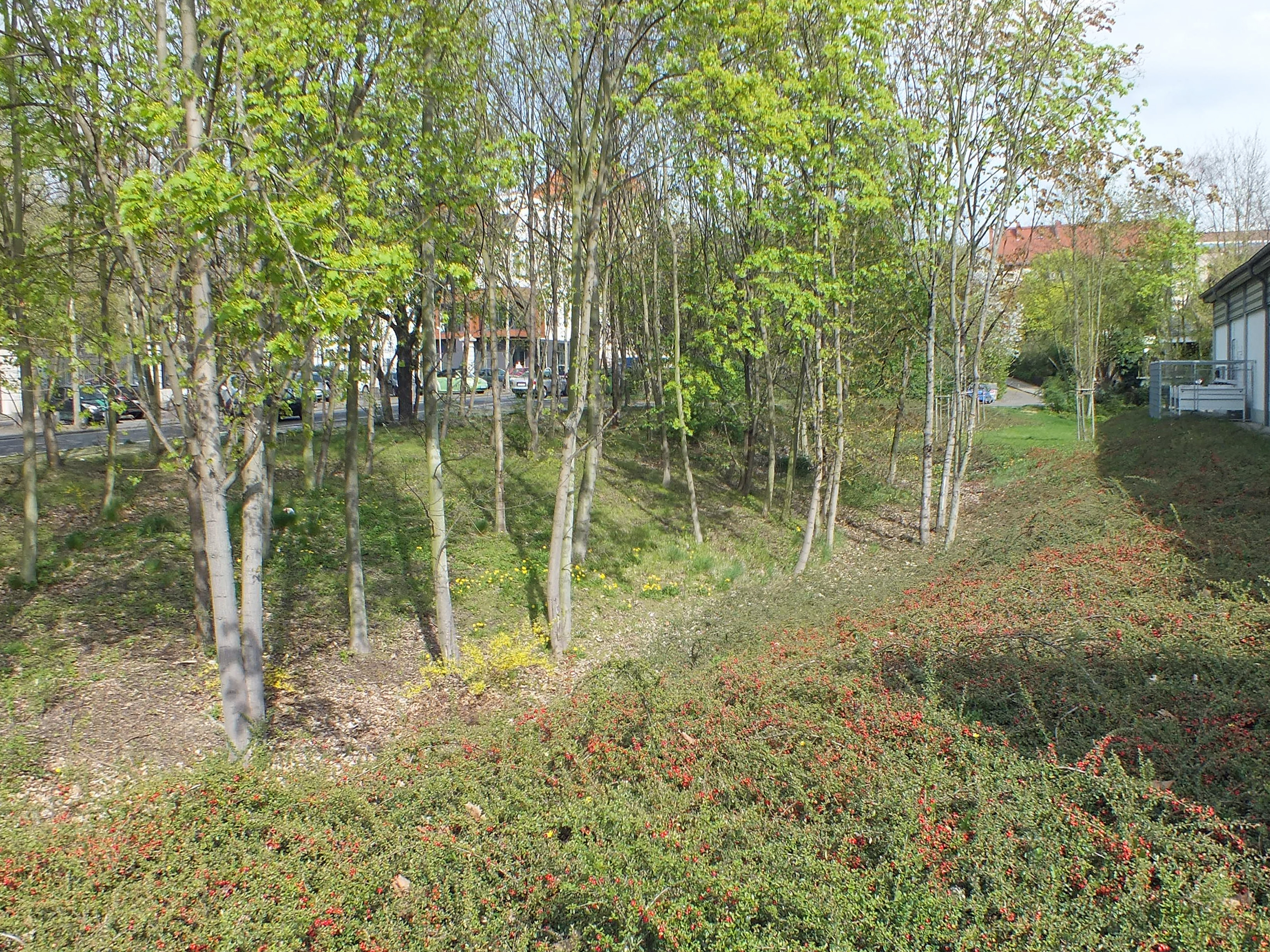 Die Stelle des ehemaligen Domgraben-Verlaufs an der Richard-Lehmann-Straße Ecke Windscheidstraße in Leipzig